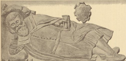 надгробок Станiслава Ганеля, Латинська катедра у Львовi